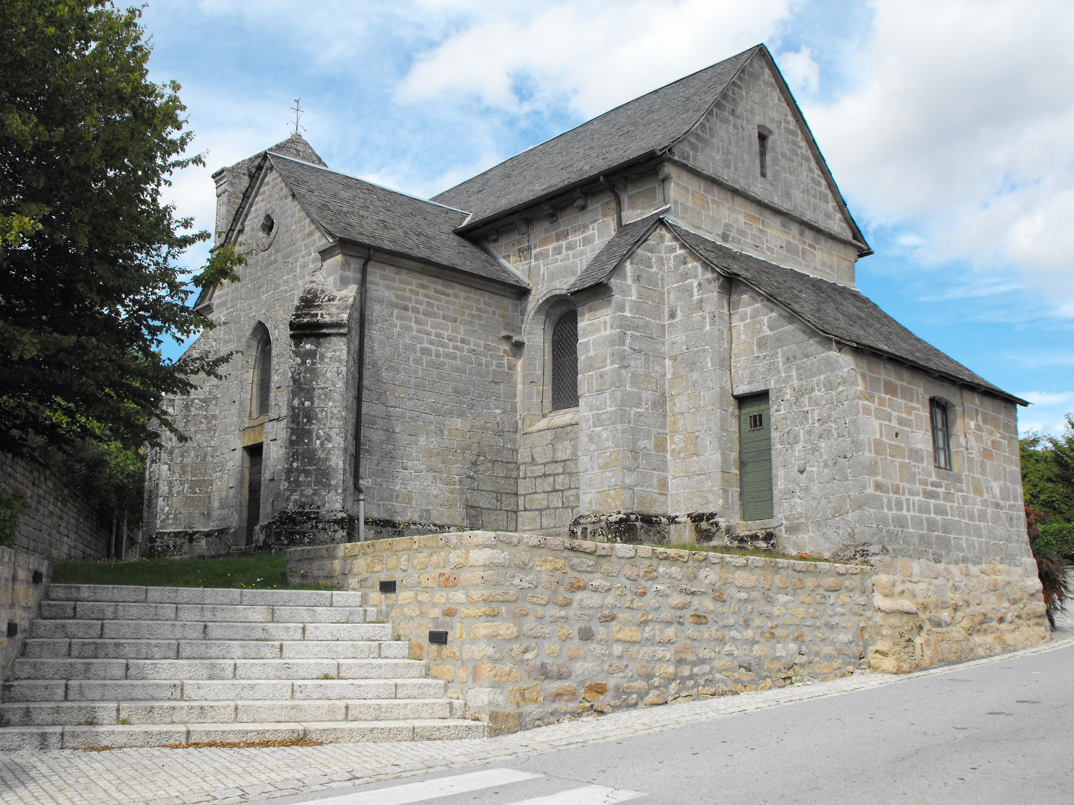 l'église